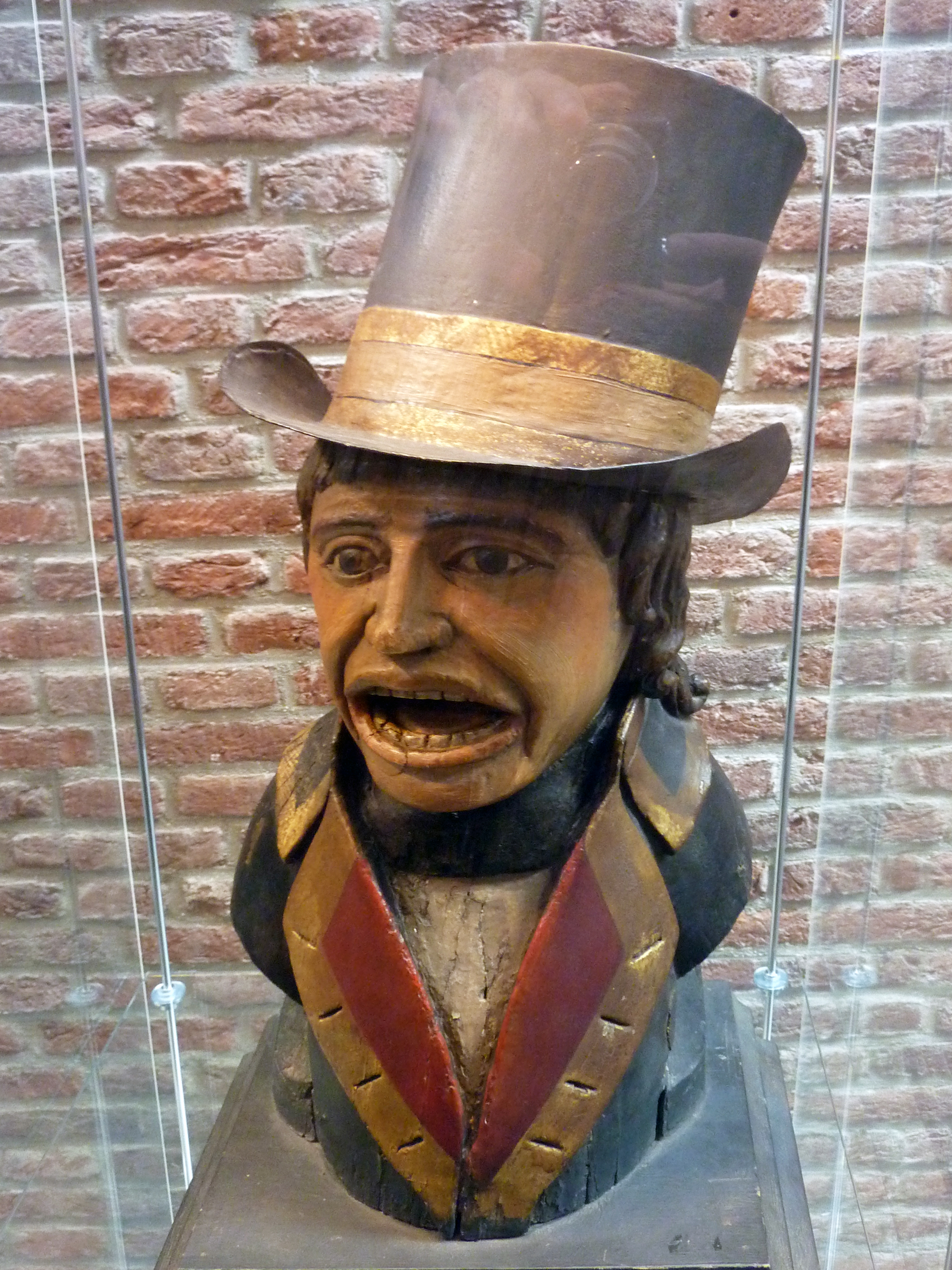 Museum Boerhaave, Leiden - Gaper (Bruikleen van Amsterdam Museum)